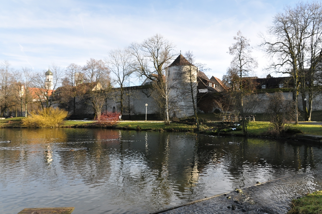 Ein Spaziergang durch Isny im Allgäu im Dez 2012